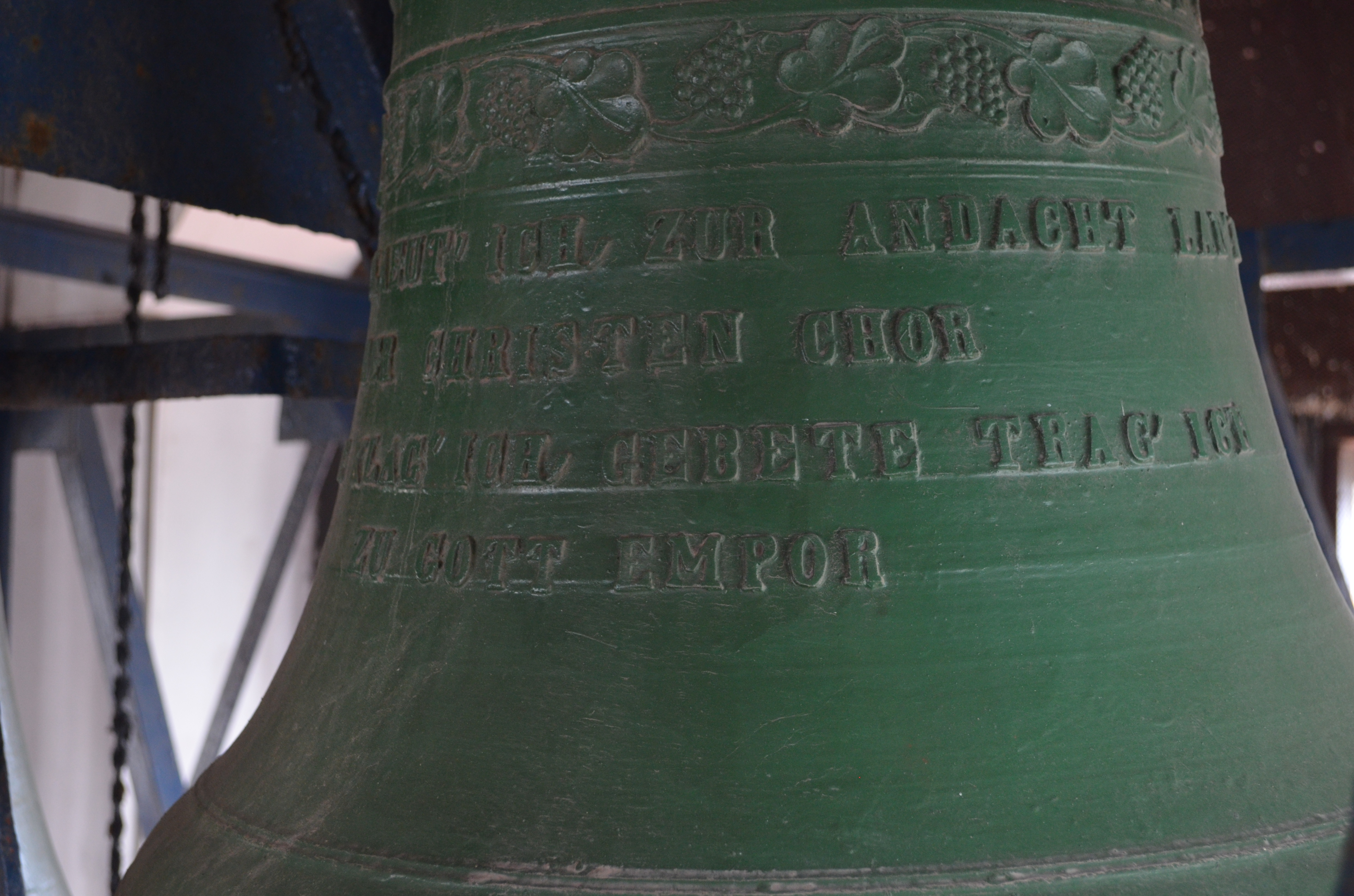 Kyrkklocka